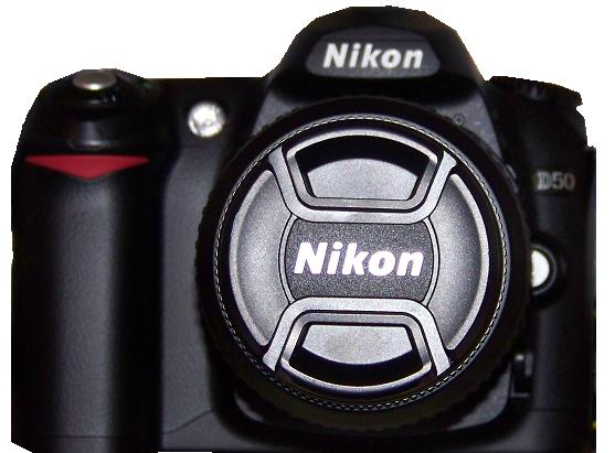 Nikon D50 - taget af mig selv.